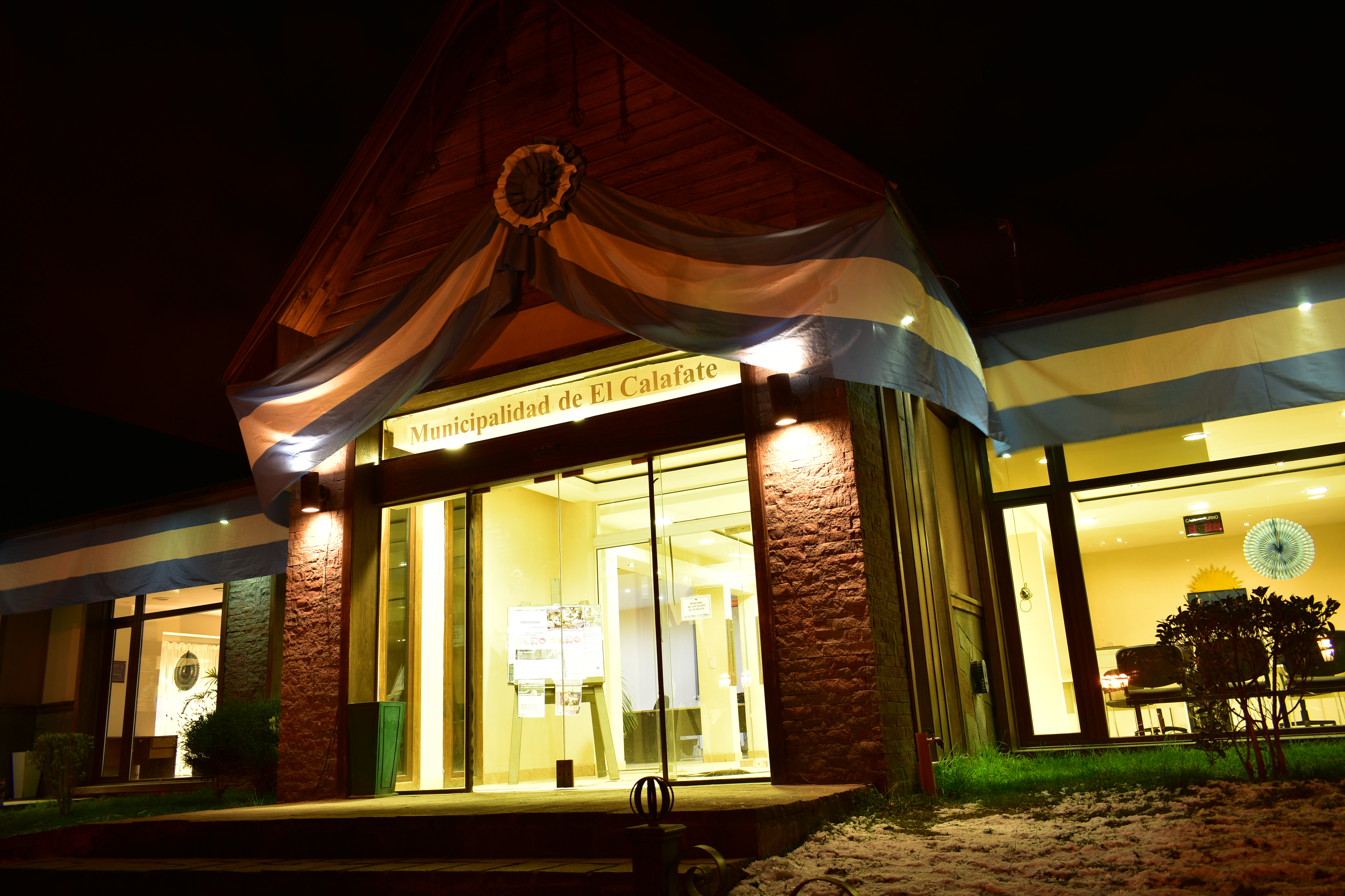 Edificio del Municipio de El Calafate.Edificio Municipalidad El Calafate